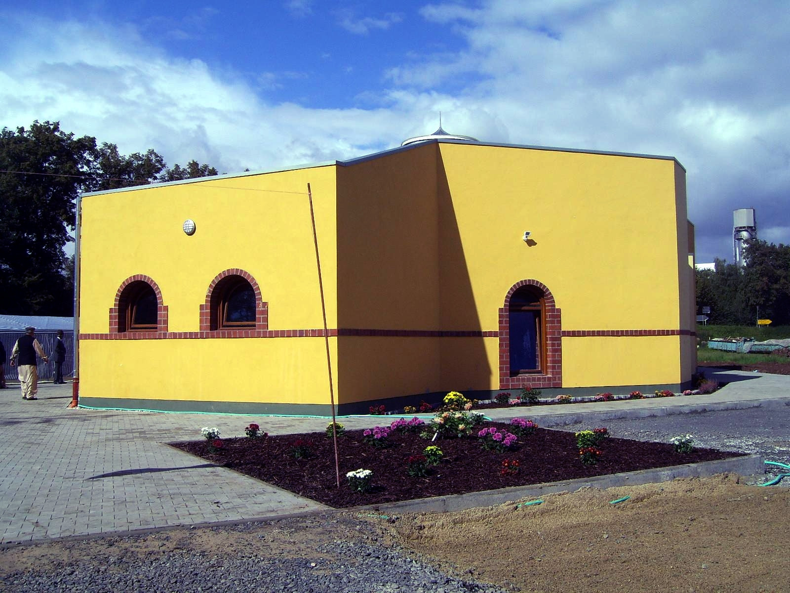 Muqeet-Mosque in Wabern (Original text: Muqeet Moschee in Wabern bei Kassel, aufgenommen kurz vor der Eröffnung der Moschee im September 2007)